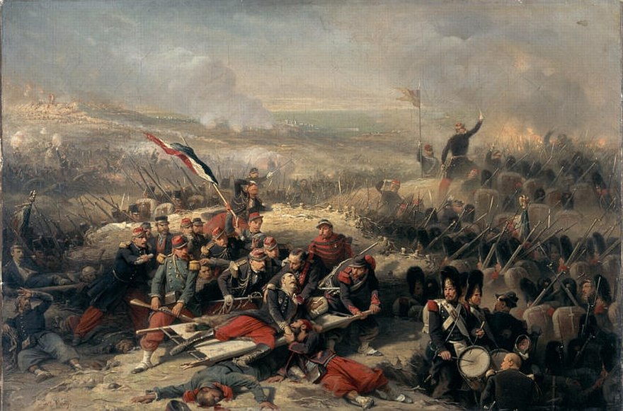 Courtine de Malakoff, 8 septembre 1855 par Adolphe Yvon